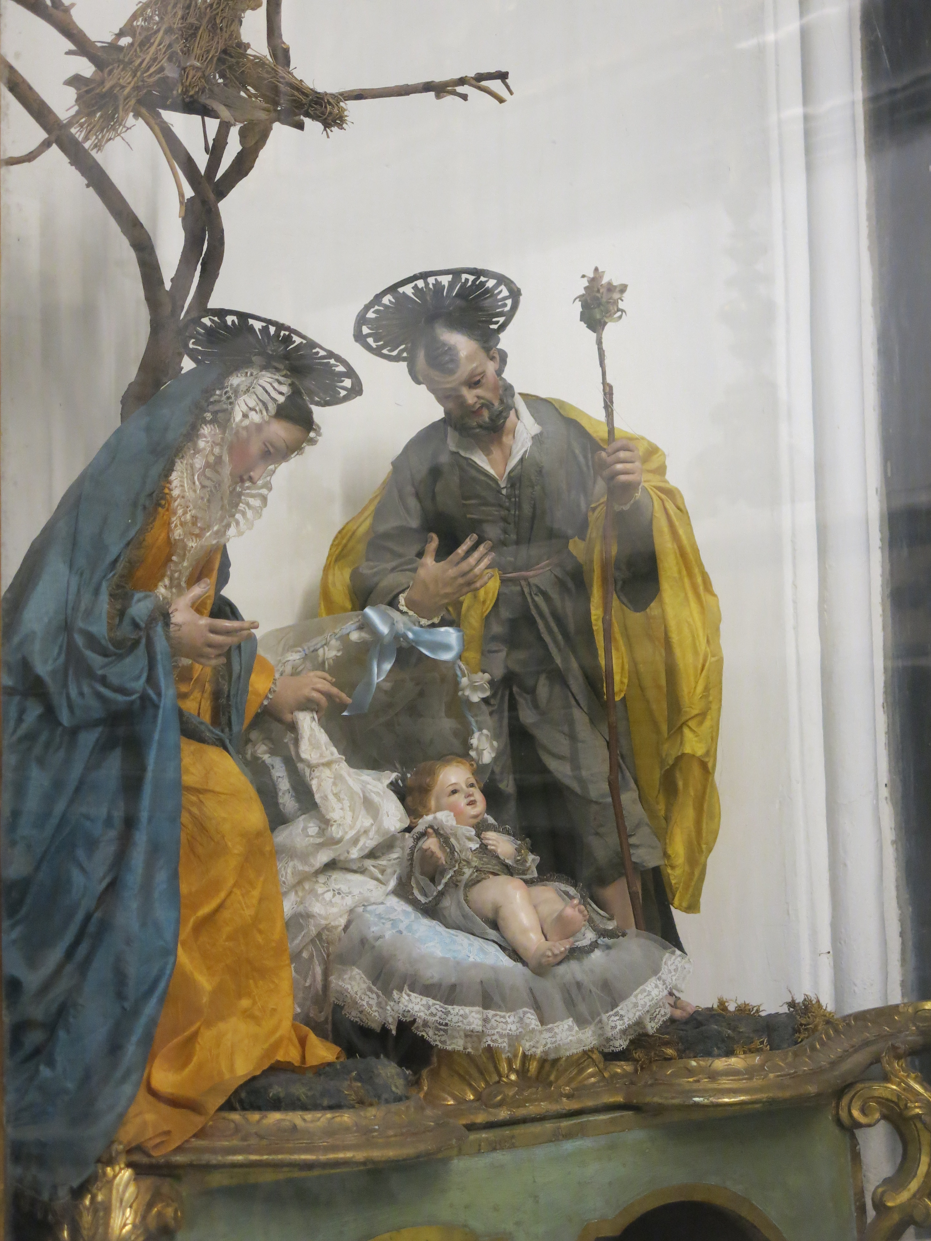 Le chiese di Napoli